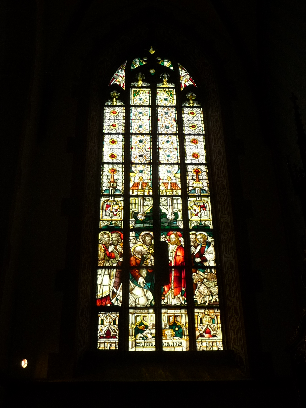 katholische Kirche St. Aposteln in Viernheim, im Kreis Bergstraße (Hessen)